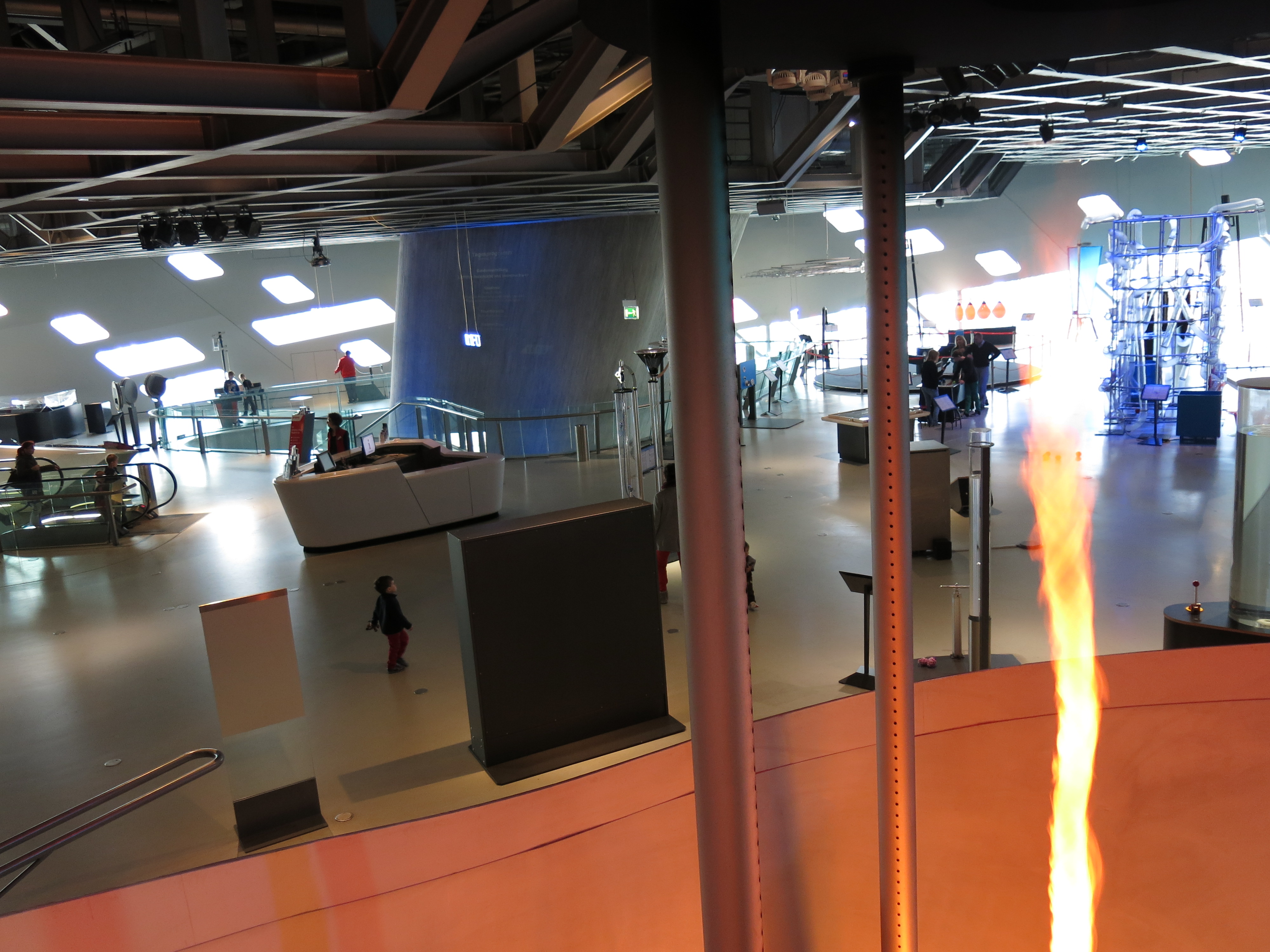 Ausstellungsflaeche